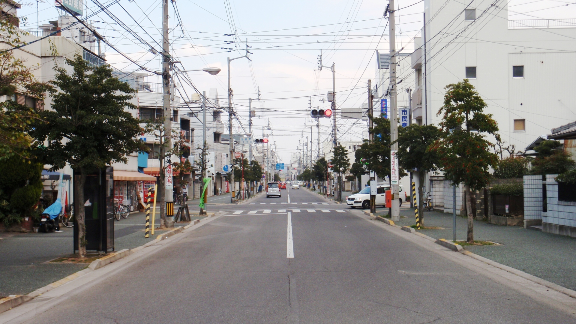 香川県高松市の八幡通りの風景。起点の石清尾八幡宮前から東を見る。